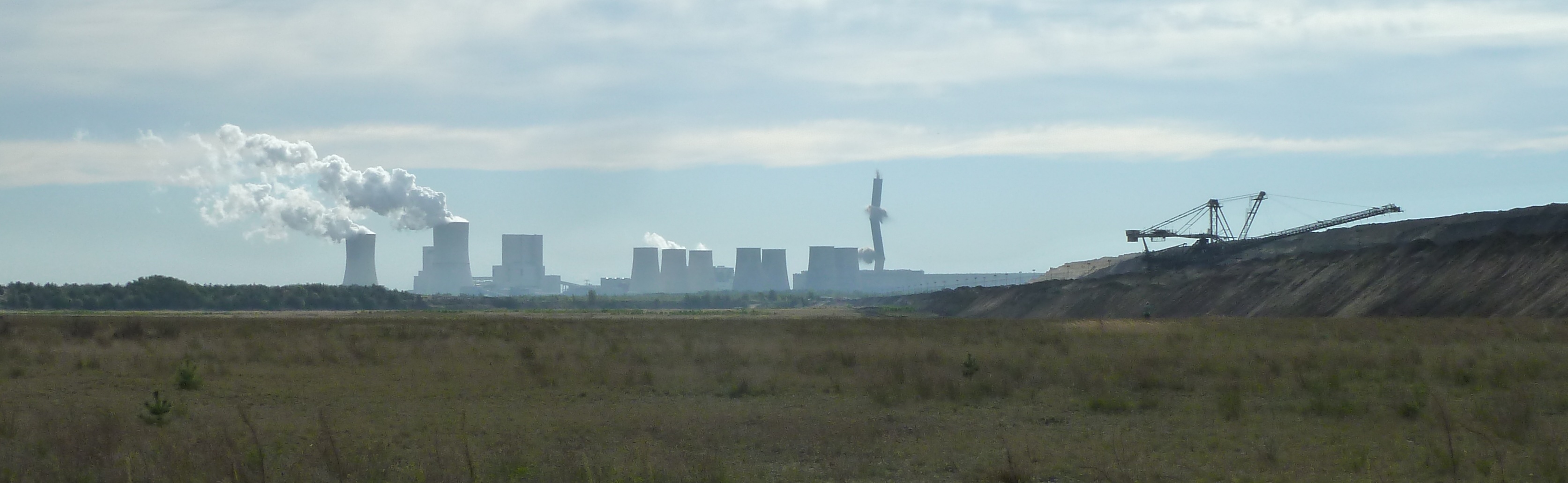 Blick auf das Kraftwerk Boxberg aus nördlicher Richtung während der Sprengung des letzten Schornsteins. Der Standort der Aufnahme war auf dem rekultivierten Teil des Tagebaus Nochten (Spreestraße, Abzweig GWRA Tzschelln).